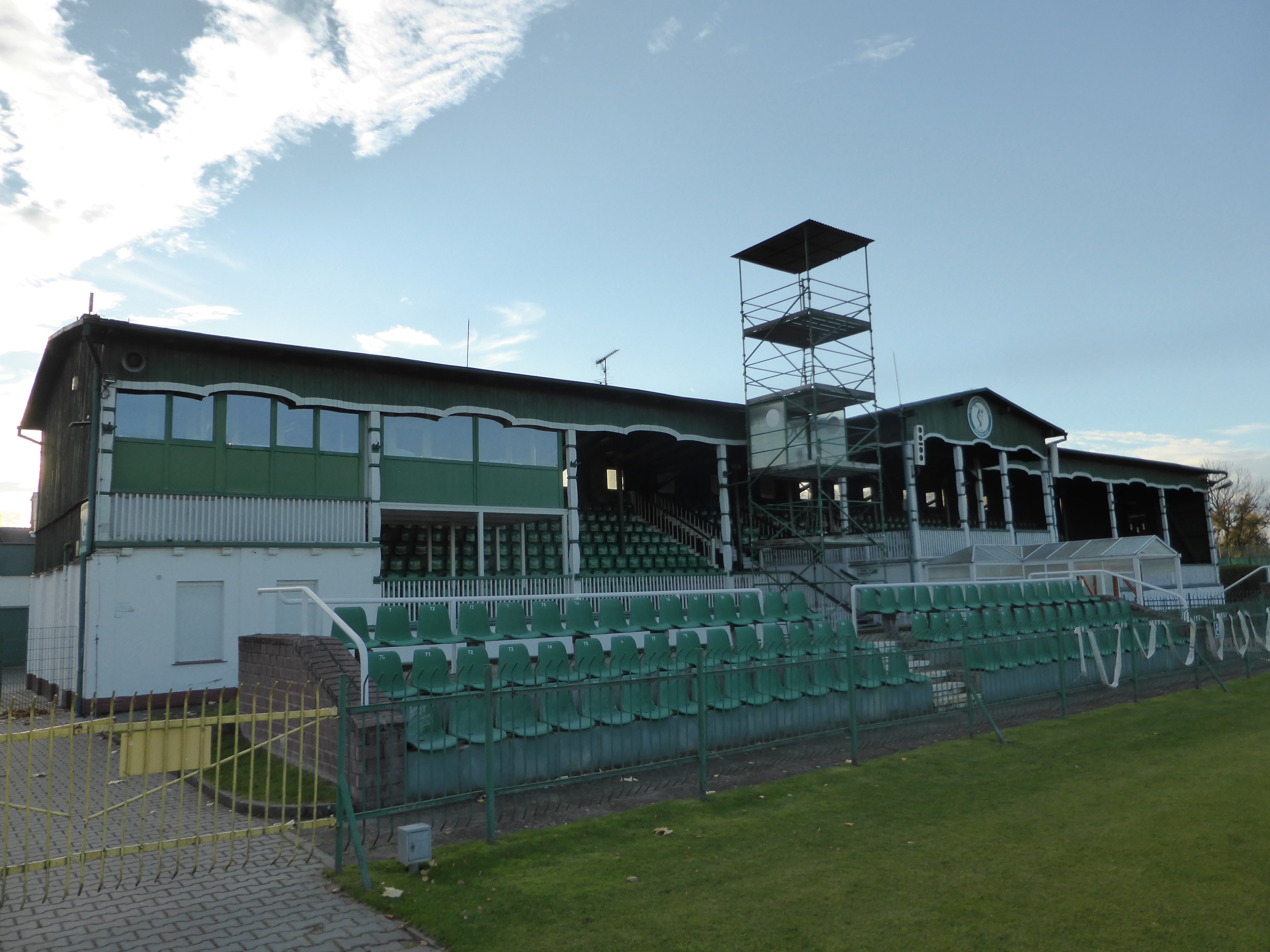 Stadion Dyskobolii w Grodzisku Wlkp. - zabytkowa trybuna drewniana